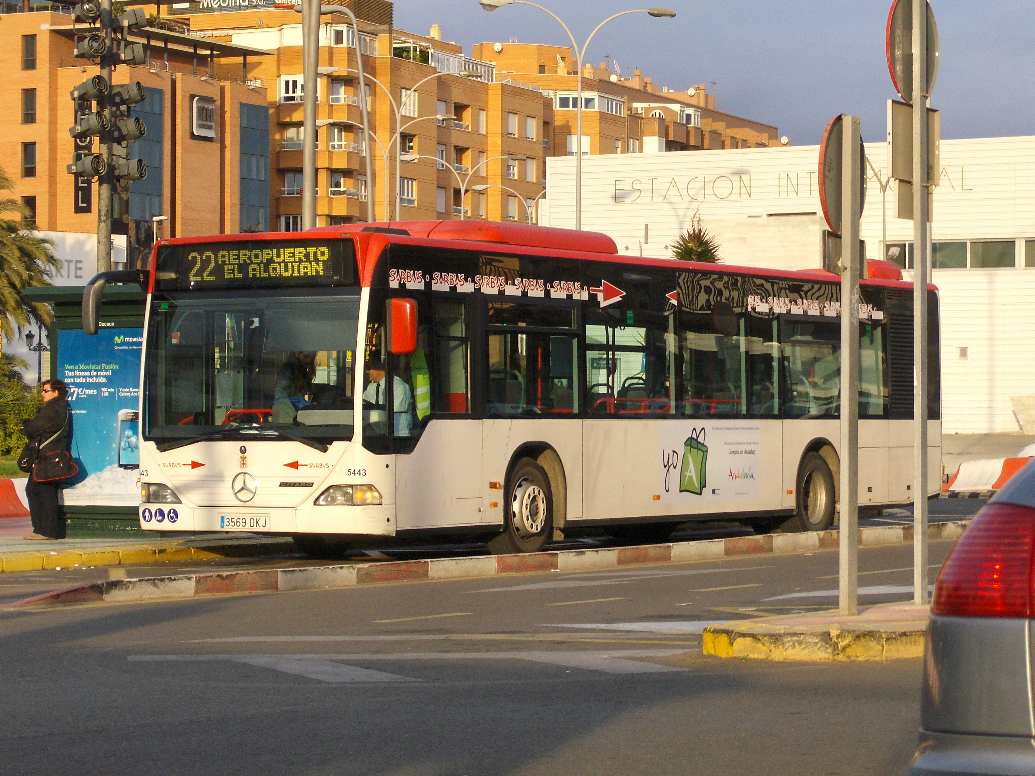 Mercedes Benz Citaro haciendo el servicio de la L22 de surbus